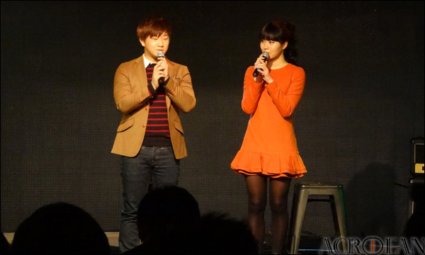 더 로맨틱 제작발표회